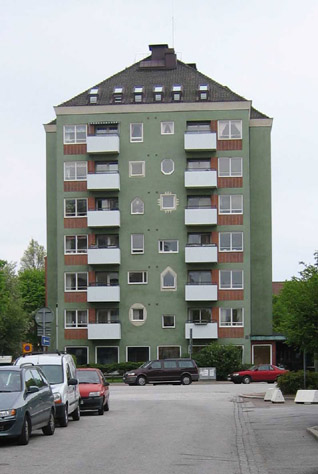 Kollektivhuset Malmö ark Thornberg